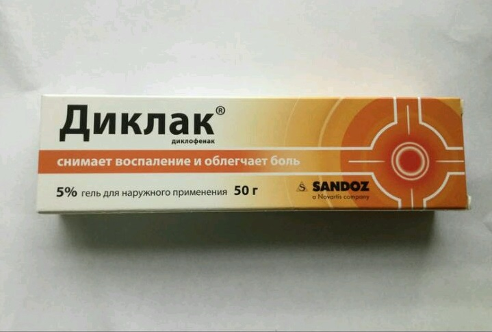 Препарат на основе диклофенака